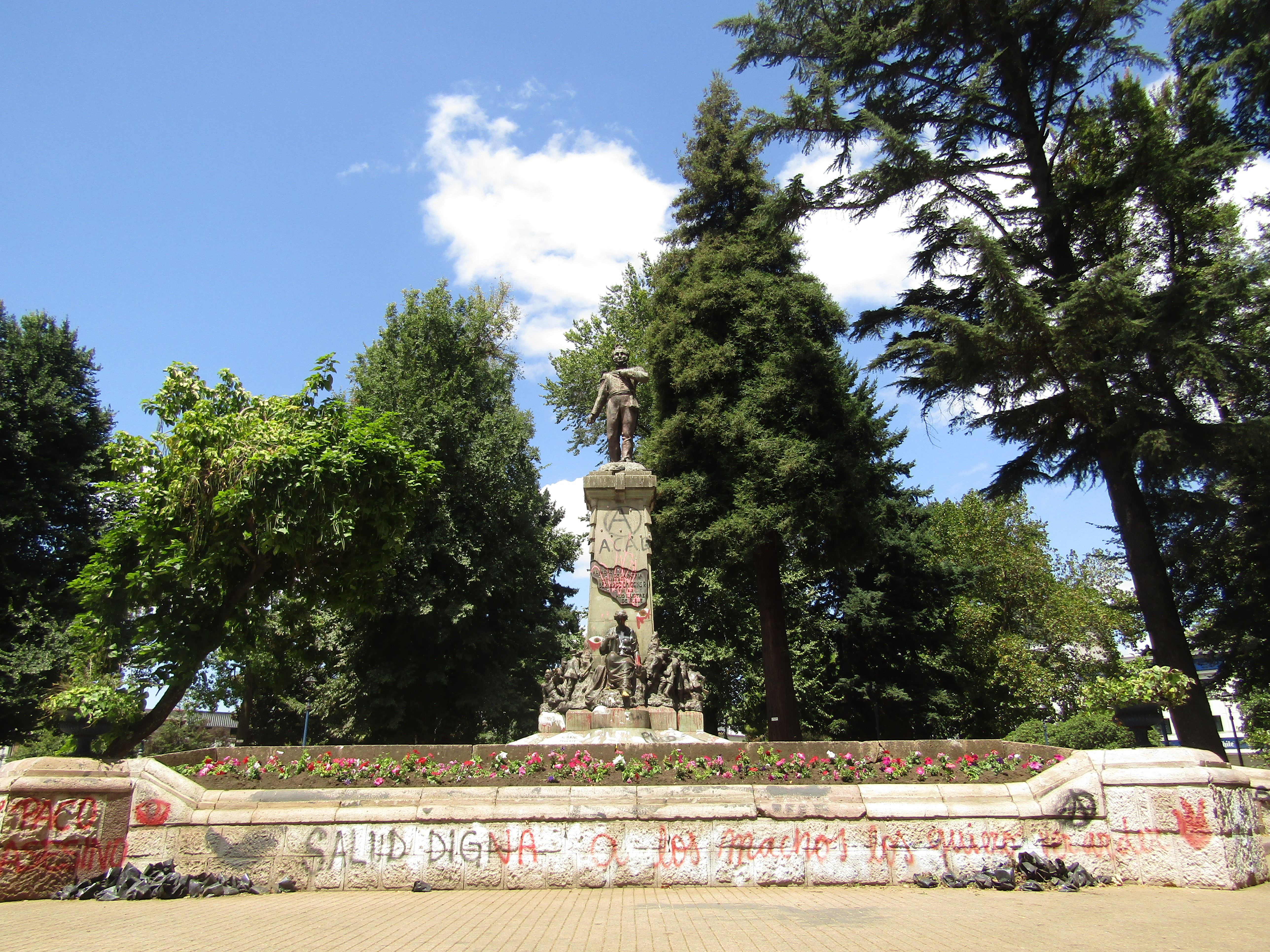 Estatua de Bernardo O'Higgins en plaza de armas de Chillán, febrero 2020